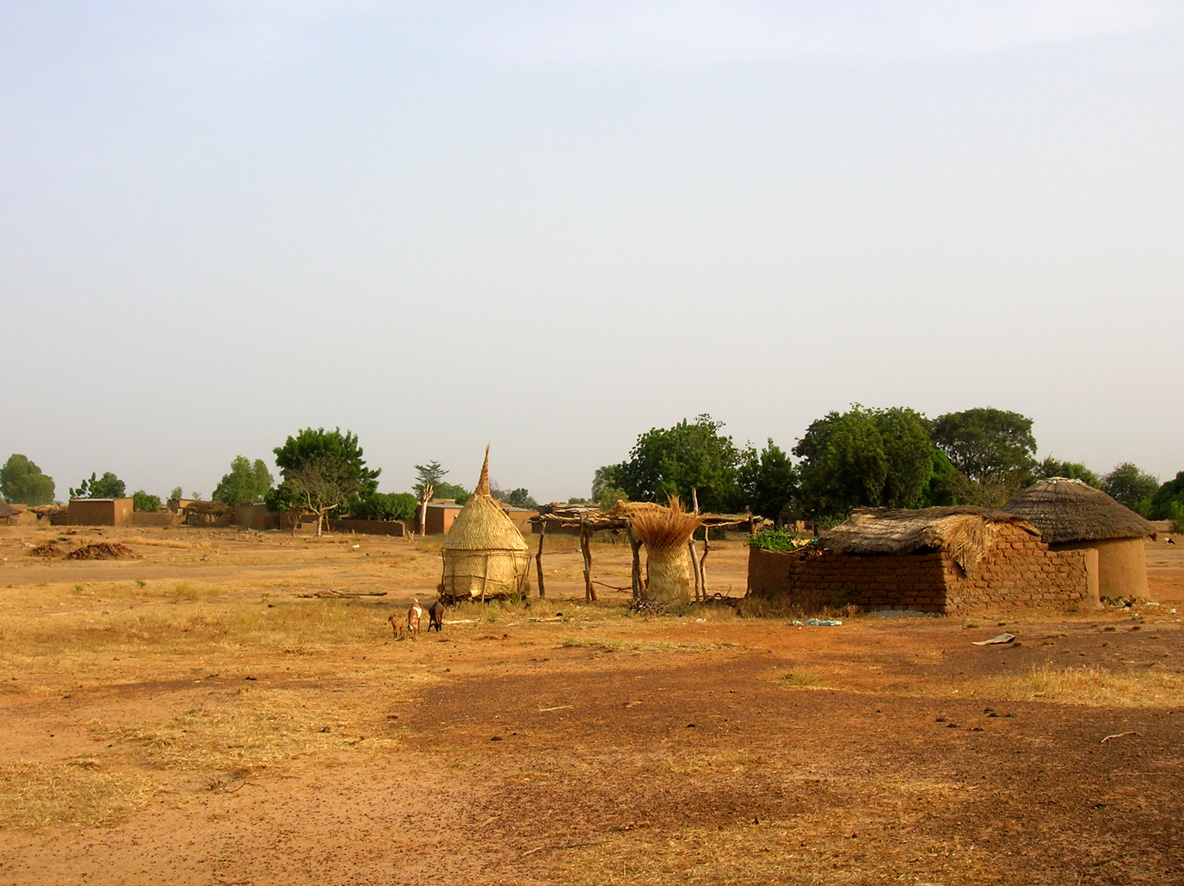 Case dans le secteur 9 de la ville de Fada N'Gourma dans le Burkina Faso. Le secteur 9 est la plus ancienne partie de la ville et la partie avec le taux le plus haut d'animistes. La case entièrement en paille est un grenier.